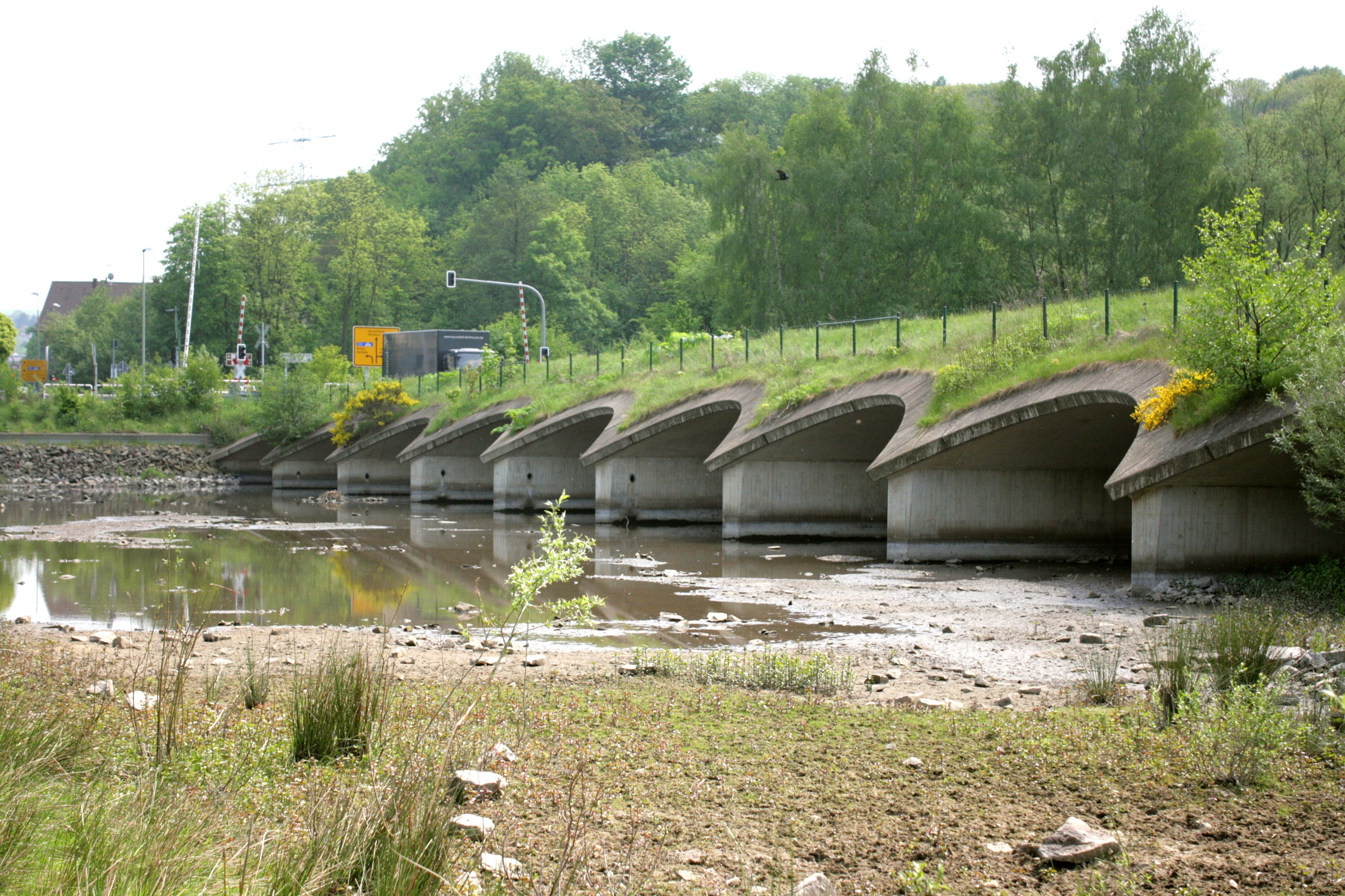 Brücke über den Pleßbach im Altarm der Ruhr, An der Kemnade in Hattingen-Blankenstein